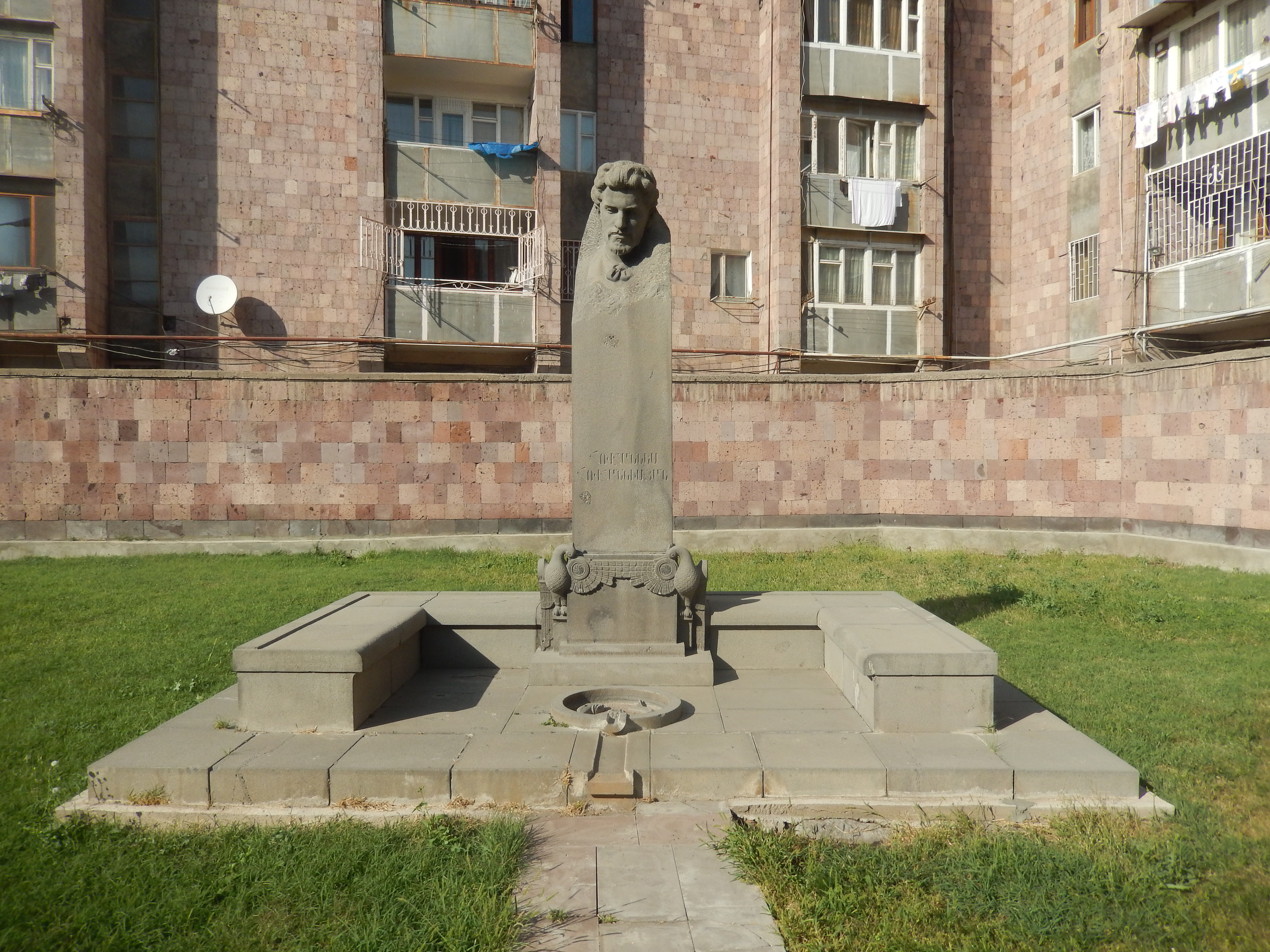 Հովհաննես Հովհաննիսյանի հուշարձան, Վաղարշապատ 2/30.1